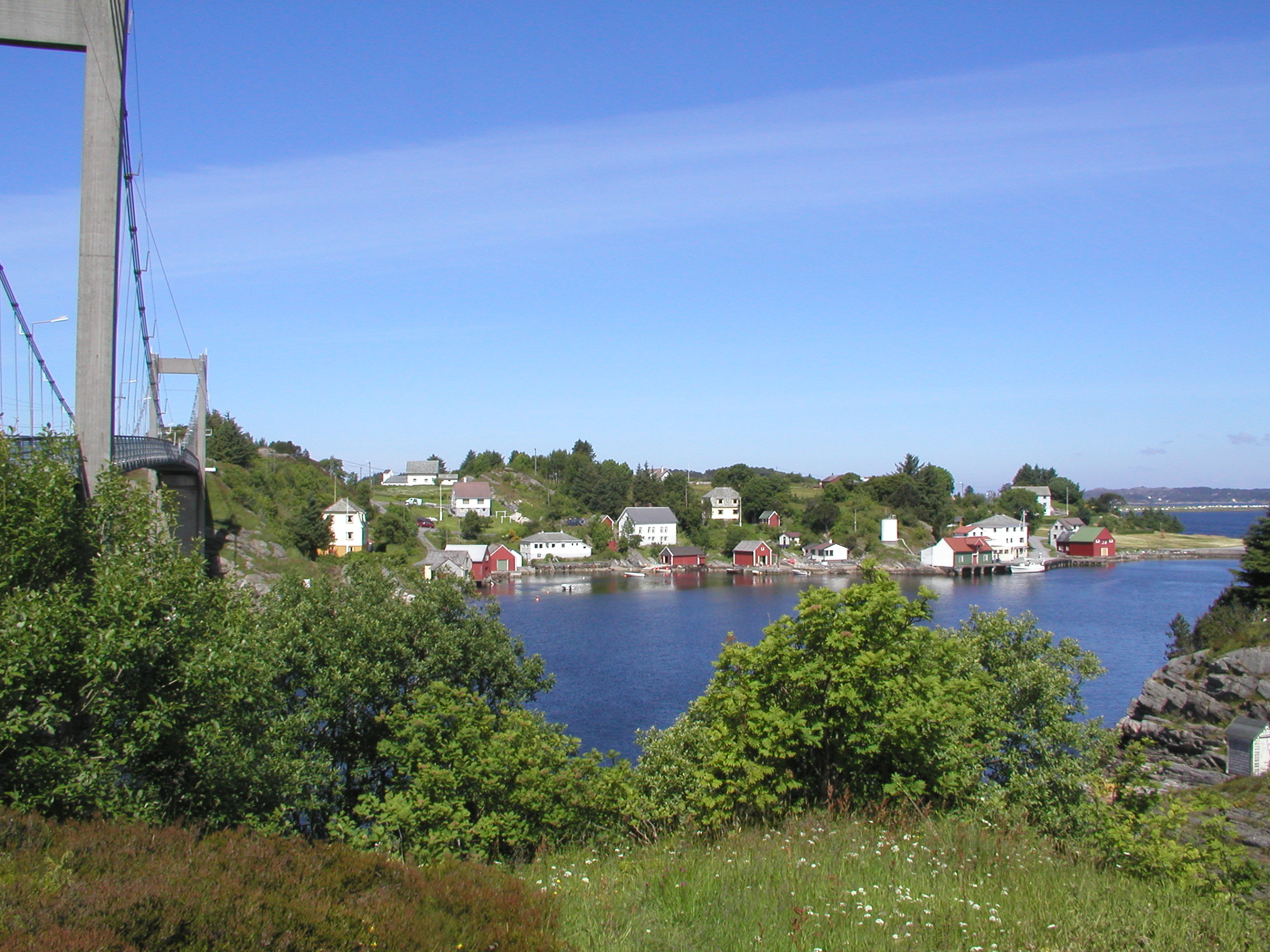 Fotografert av Arvid Mortensen